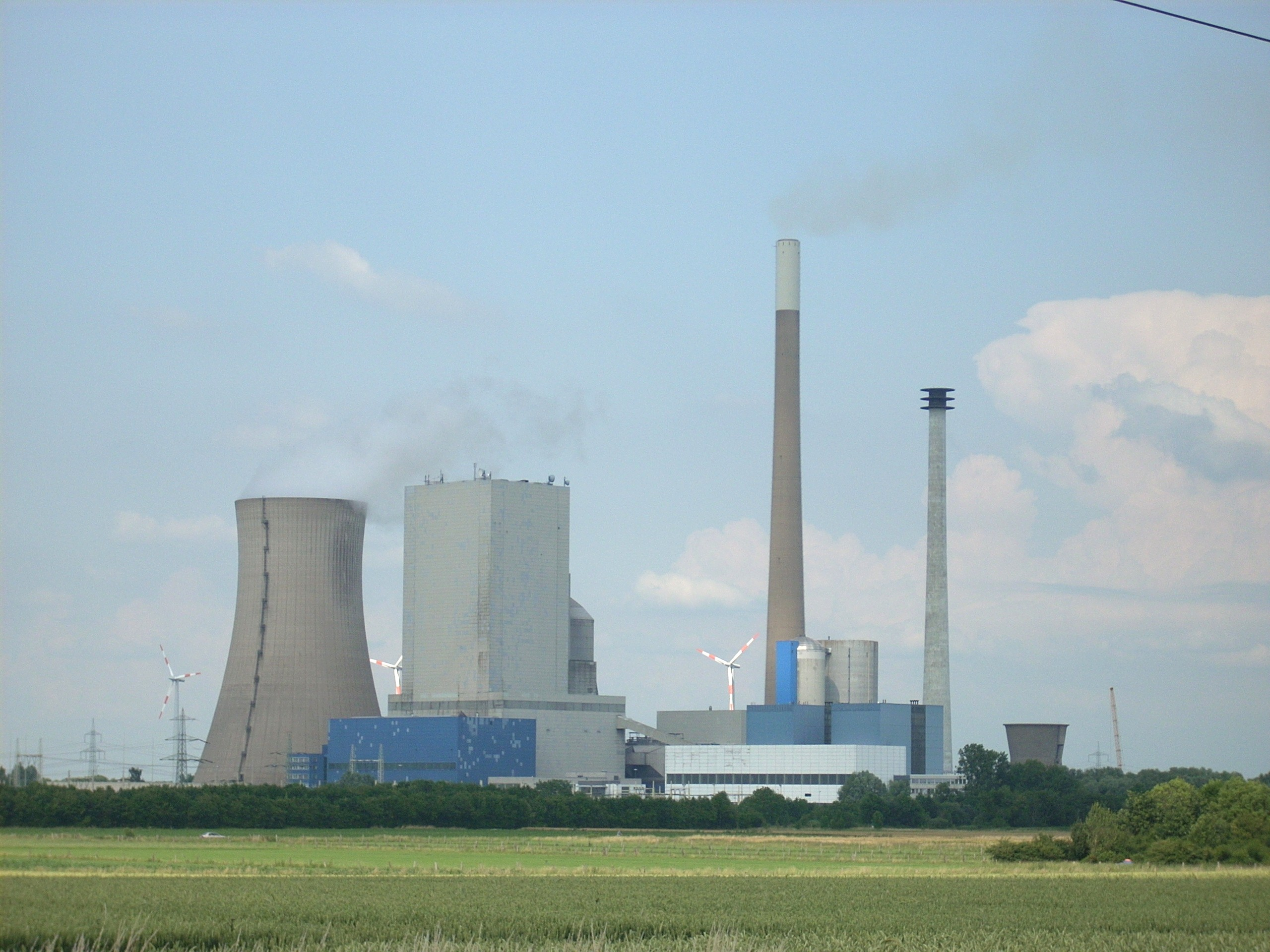 Kraftwerk Mehrum, Hohenhameln, Deutschland